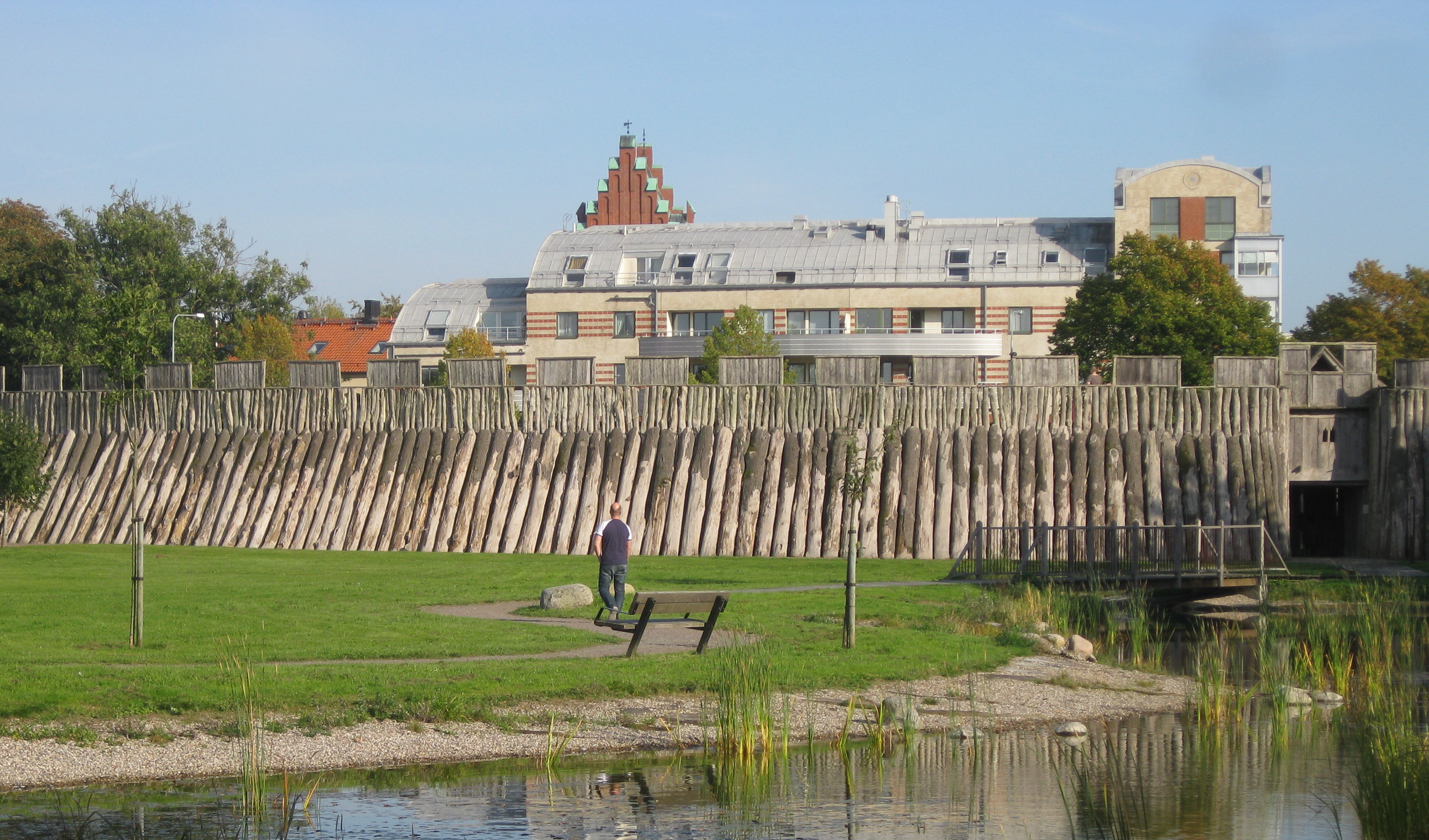 Trelleborgen, rekonstruerad del av ringborg i Trelleborg, Skåne